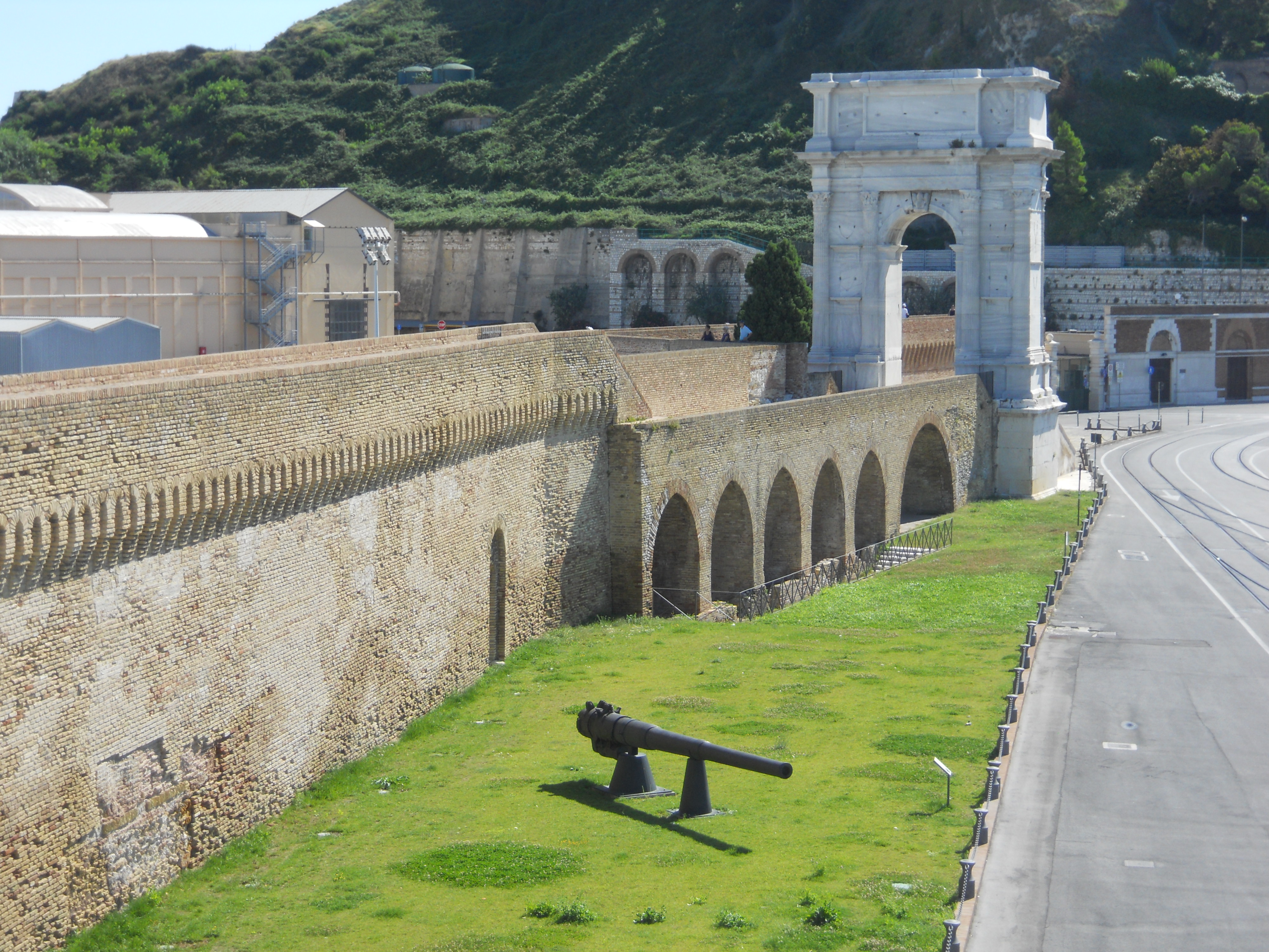 Attributo all'architetto Apollodoro di Damasco, eretto nel 115 d.C. sul molo che l'Imperatore volle a protezione del porto, è fin dall'epoca romana uno dei simbolo della città e della sua apertura verso i paesi del Mediterraneo orientale. This is a photo of a monument which is part of cultural heritage of Italy.